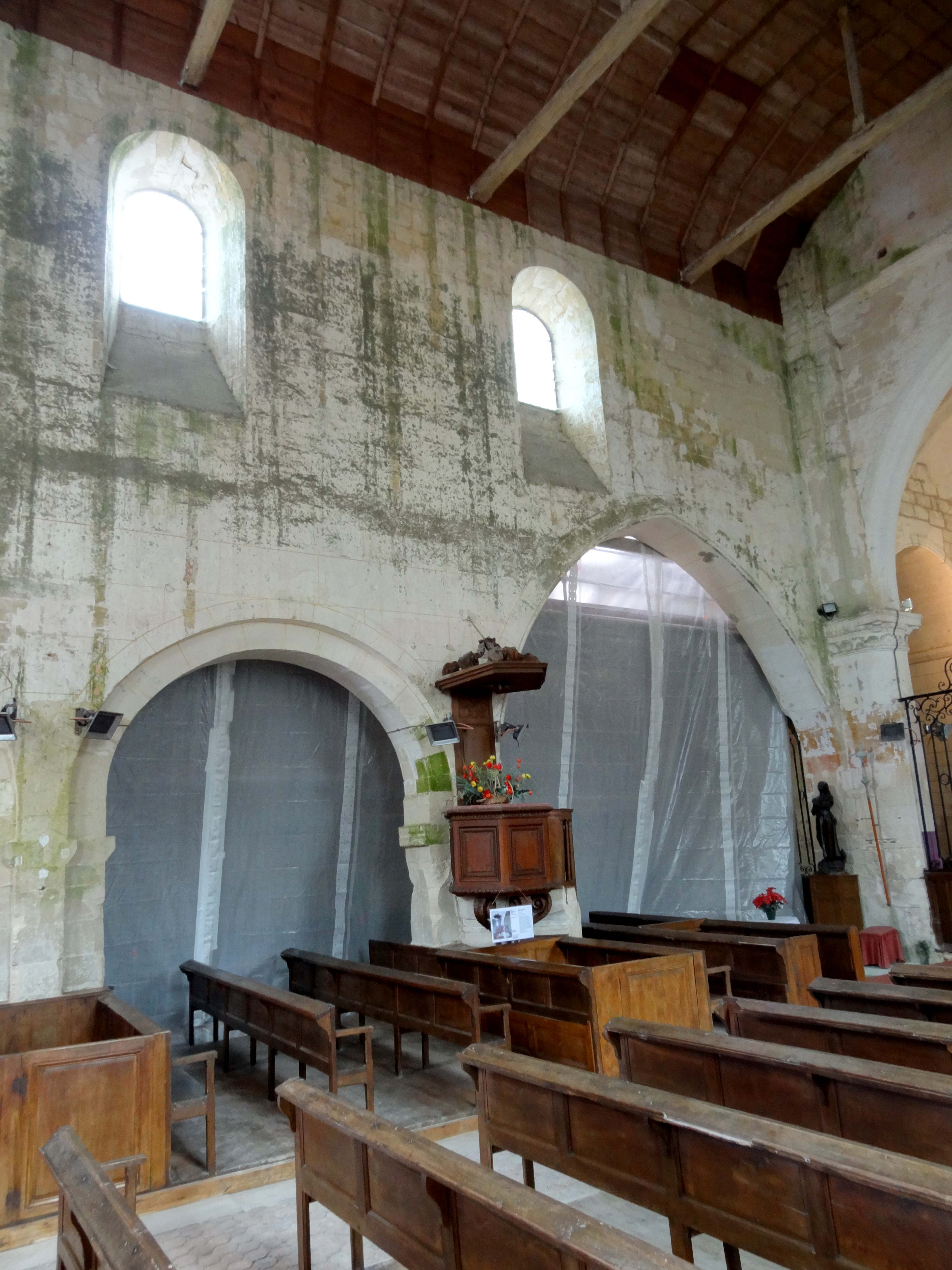 Intérieur de l'église - voir titre.